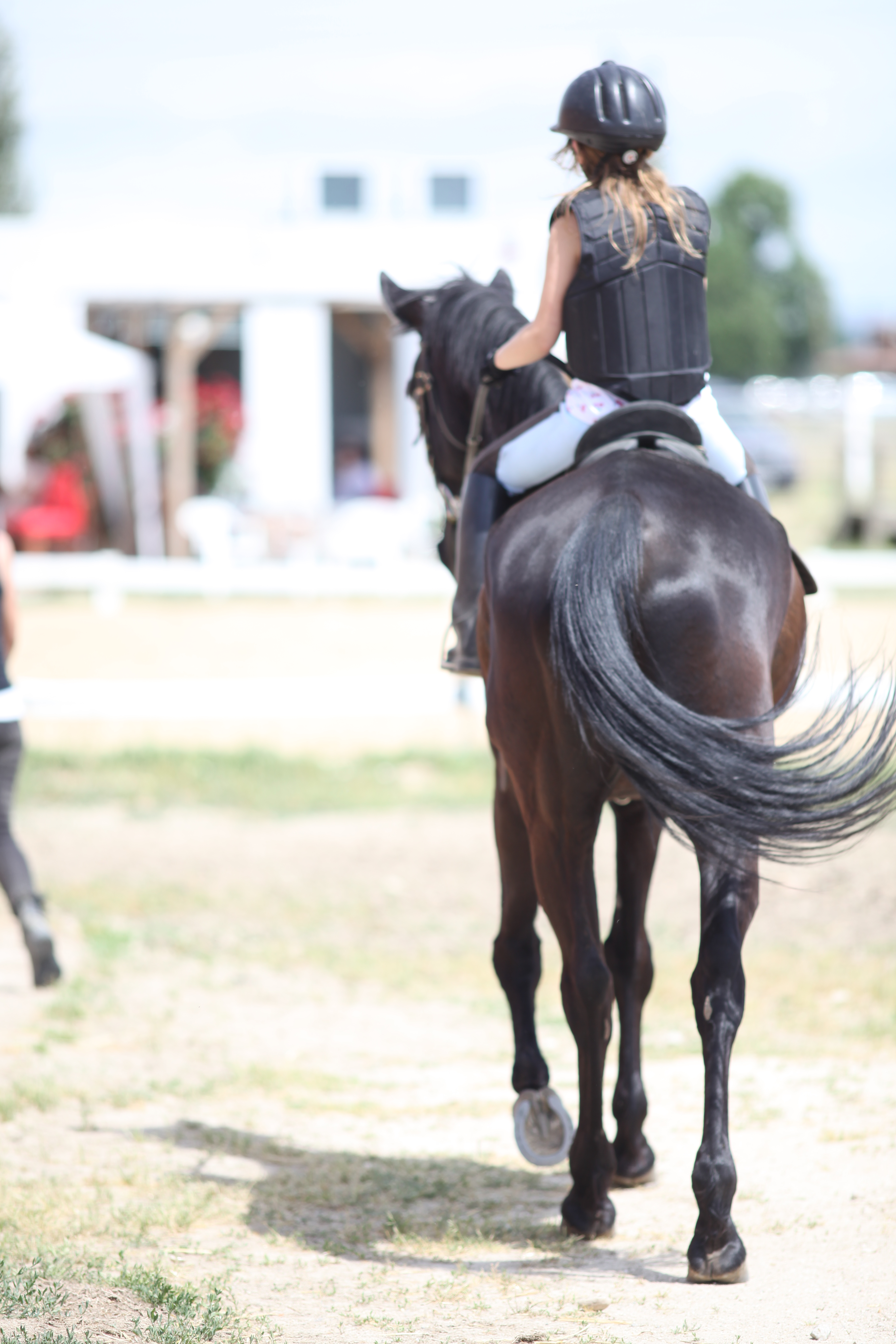 Equinoterapia en la Escuela Hípica Sibaris situado en Algete (a 15 min de Madrid)